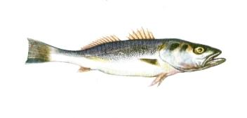 Pescadilla.